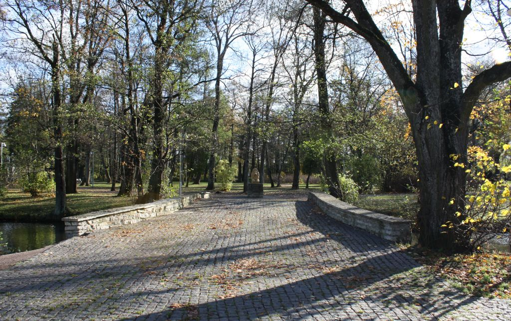 Löwenruh' park. Tallinn.